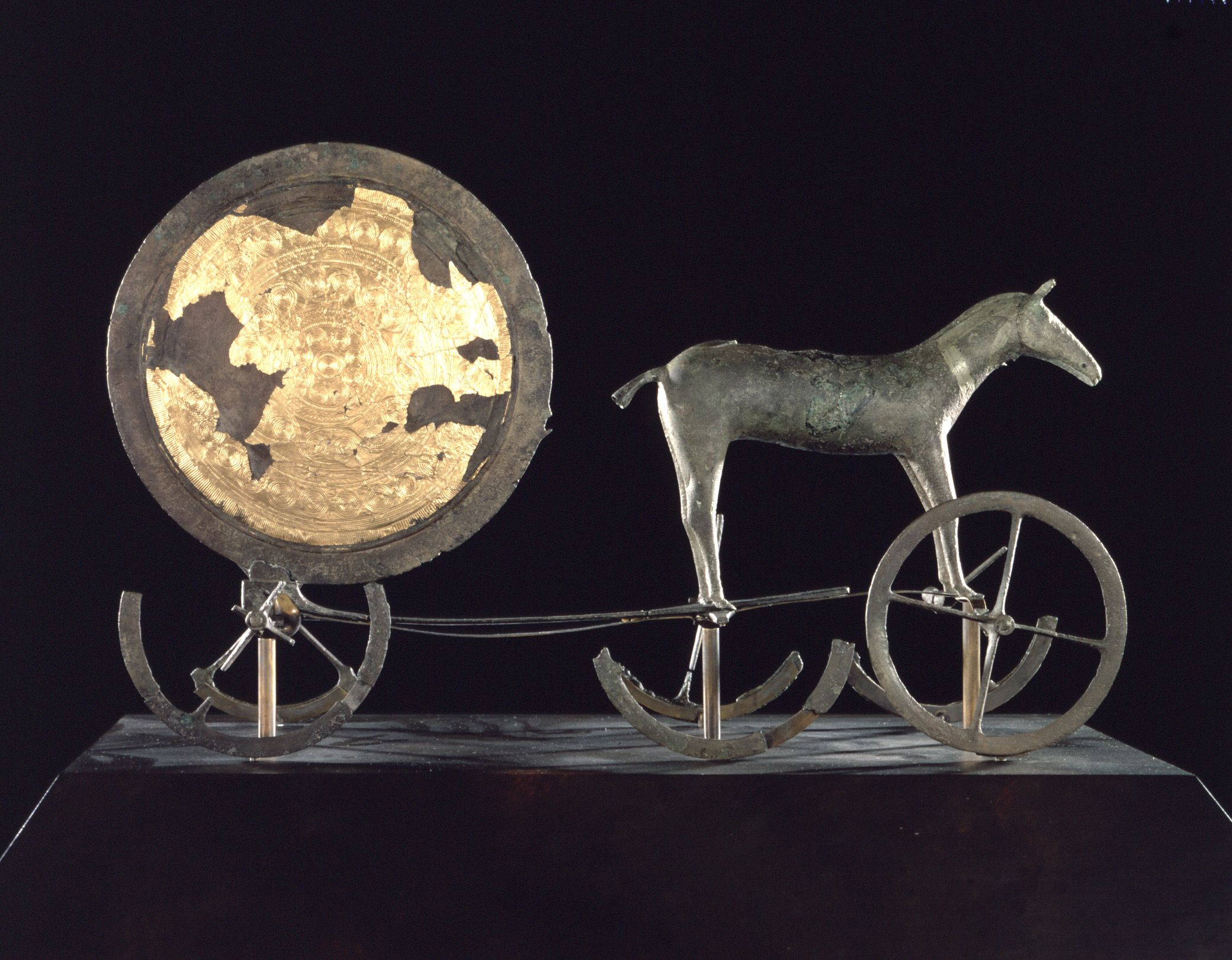 Solvognen, sort baggrund. Bronzealder, votiv/depot.